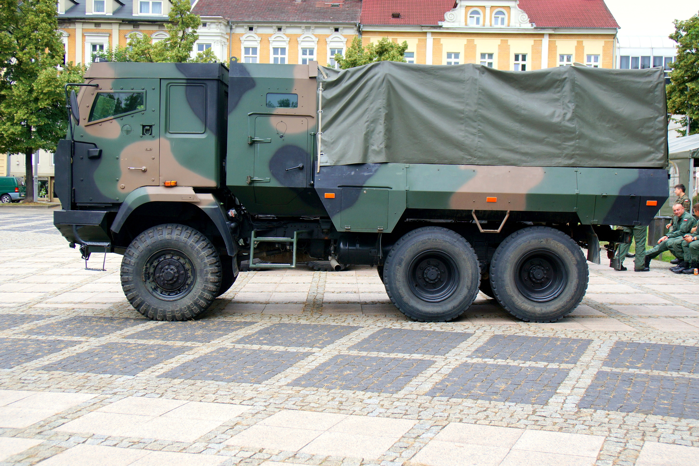 Opancerzony Star 266M przystosowany do przewożenia zestawów artyleryjskich ZU-23-2 kalibru 23 mm oraz sekcji operatorów zestawów przeciwlotniczych Grom.